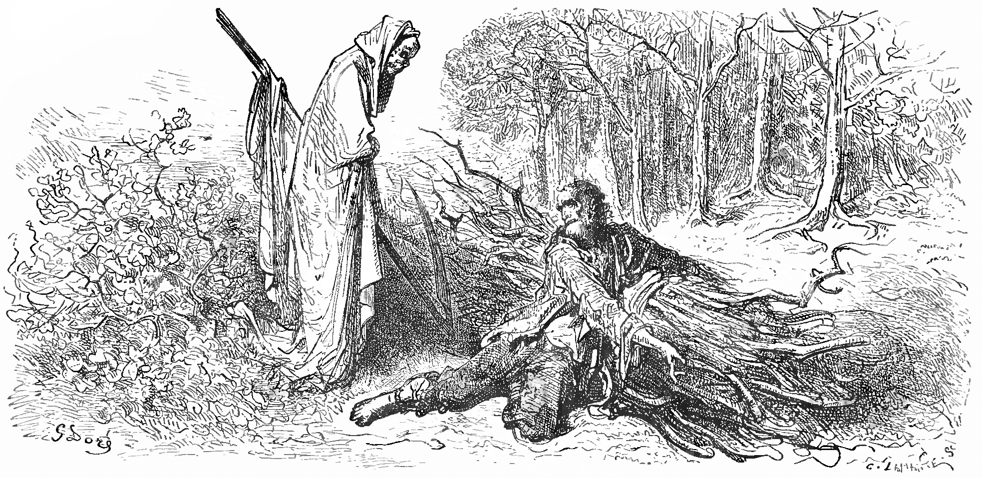 grafika z książki PL Bajki, Jean de La Fontaine, nakładem i drukiem Jana Noskowskiego, Warszawa 1876